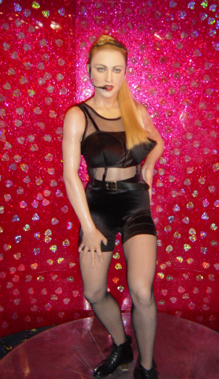 Madonna at Madame's Tussauds Hong Kong